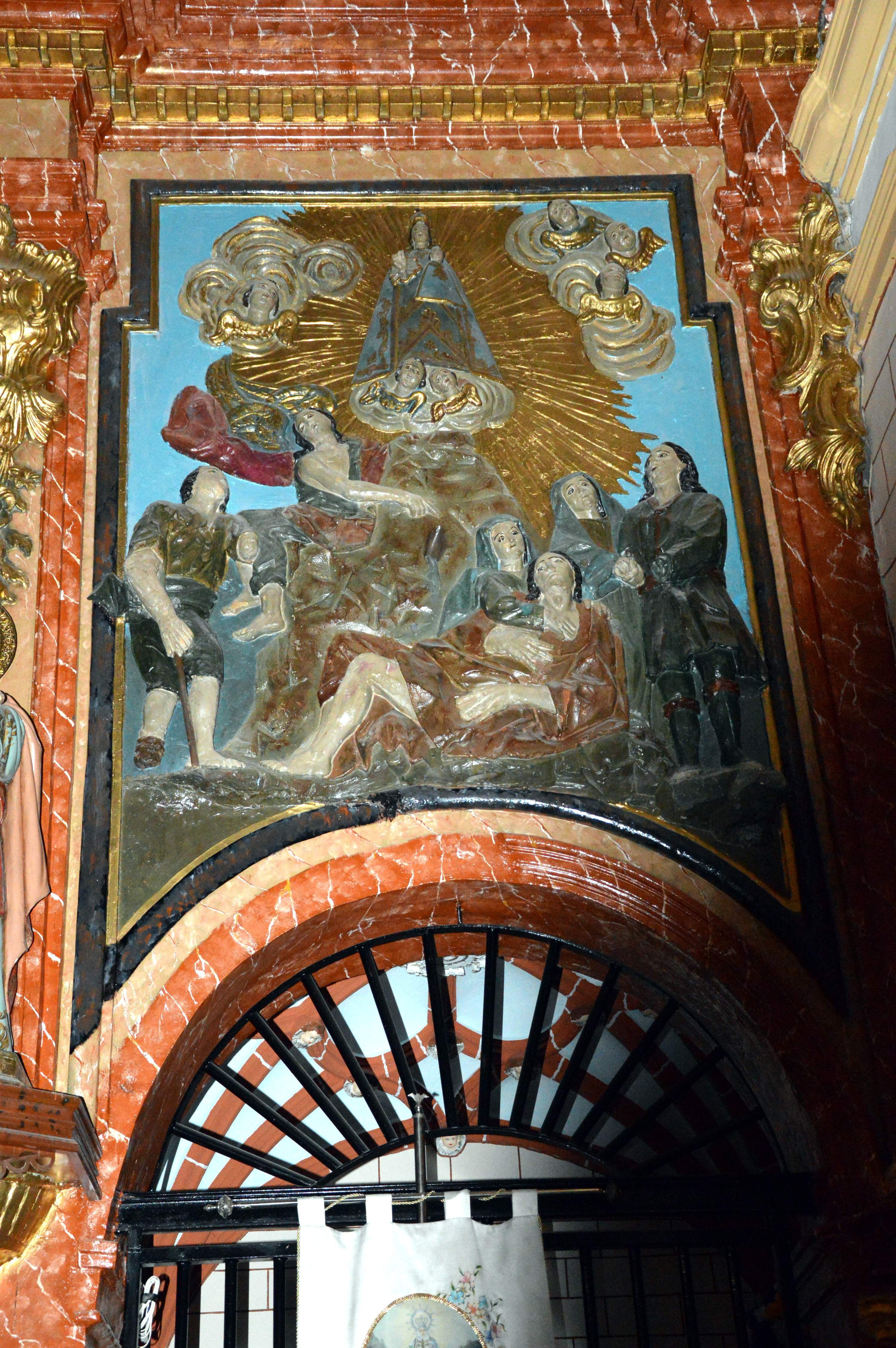 Santuario de la Fuensanta en Villel (Teruel), con detalle del frontal del presbiterio, lado de la epístola (2019).